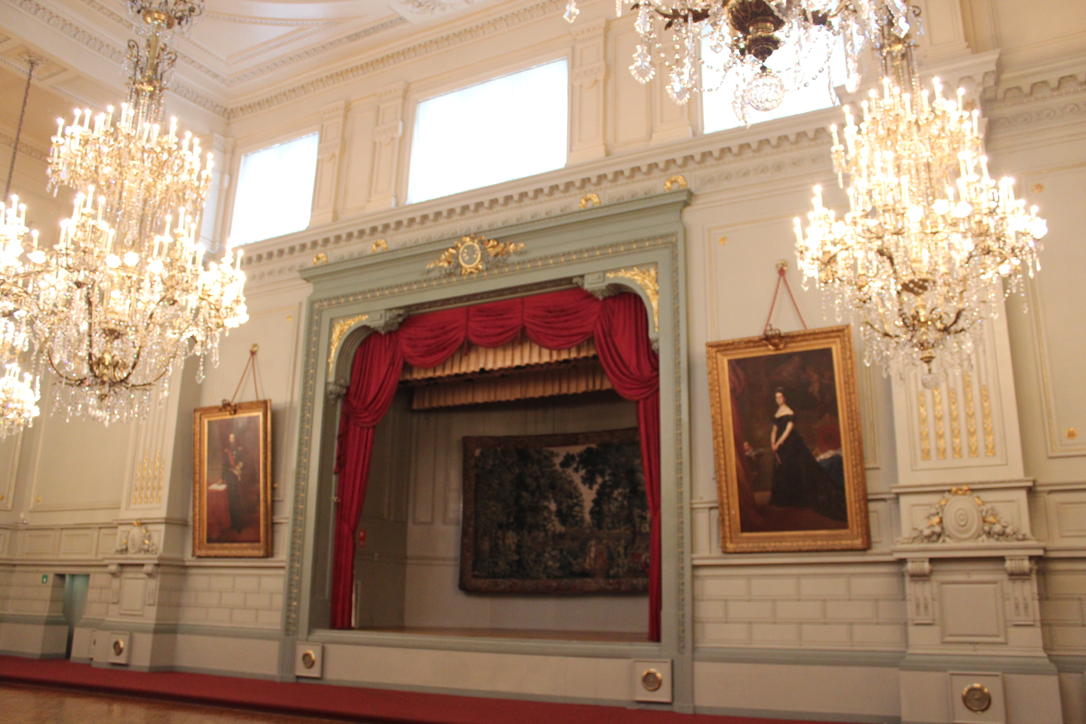 Interieur van het Concert Noble, een neoclassicistisch spektakelzaal, gebouwd 1872-1873 naar plannen van architect Henri Beyaert. Podium in de balzaal.